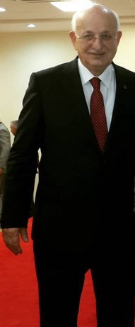 İsmail Kahraman (siyasetçi) Türkiye Büyük Millet Meclisi Başkanı